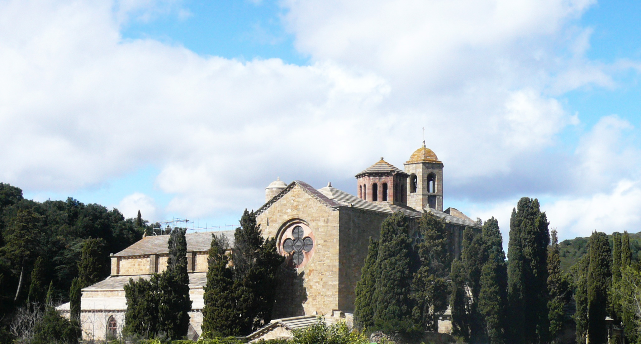 Abbaye de Fontfroide (Narbonne)